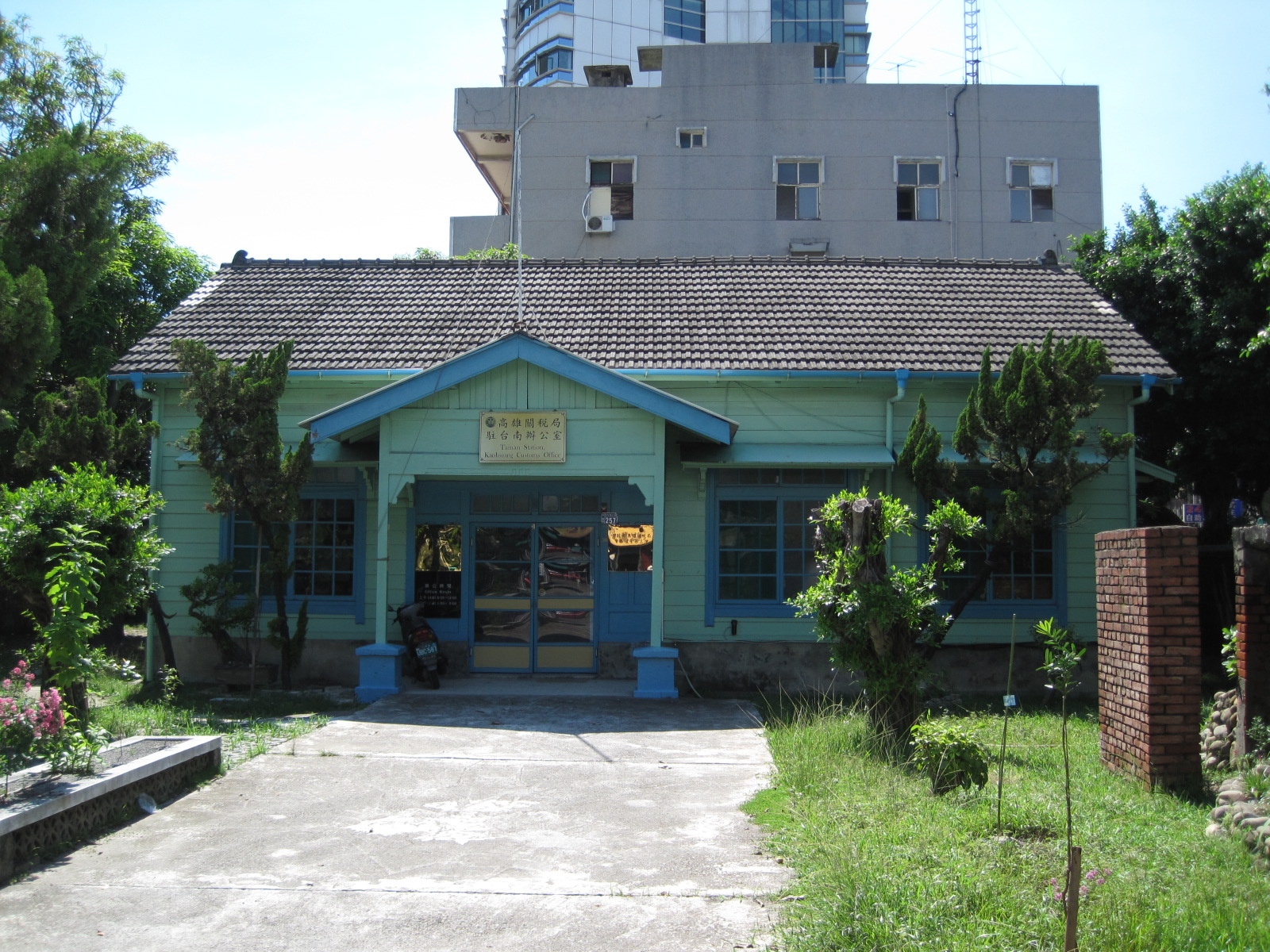 臺南市市定古蹟，原臺南運河海關